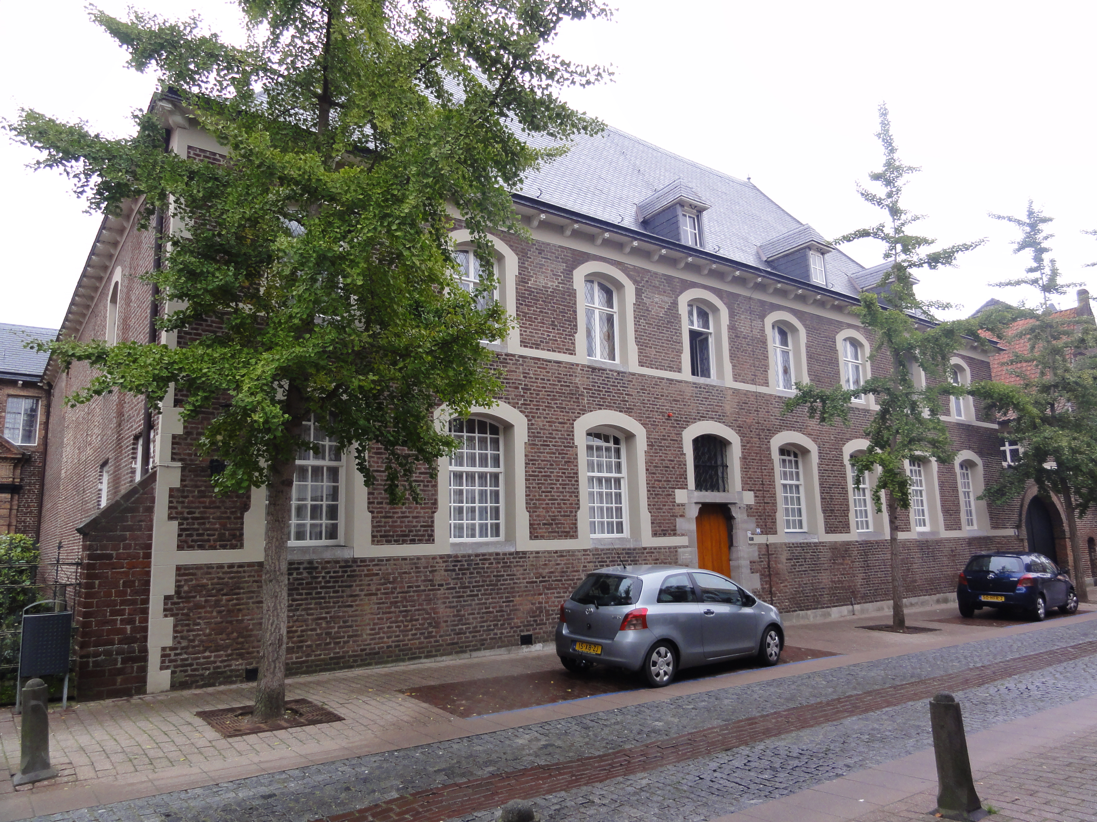 Boxmeer Rijksmonument 10031 Carmelietenklooster Steenstraat 39 35″ E